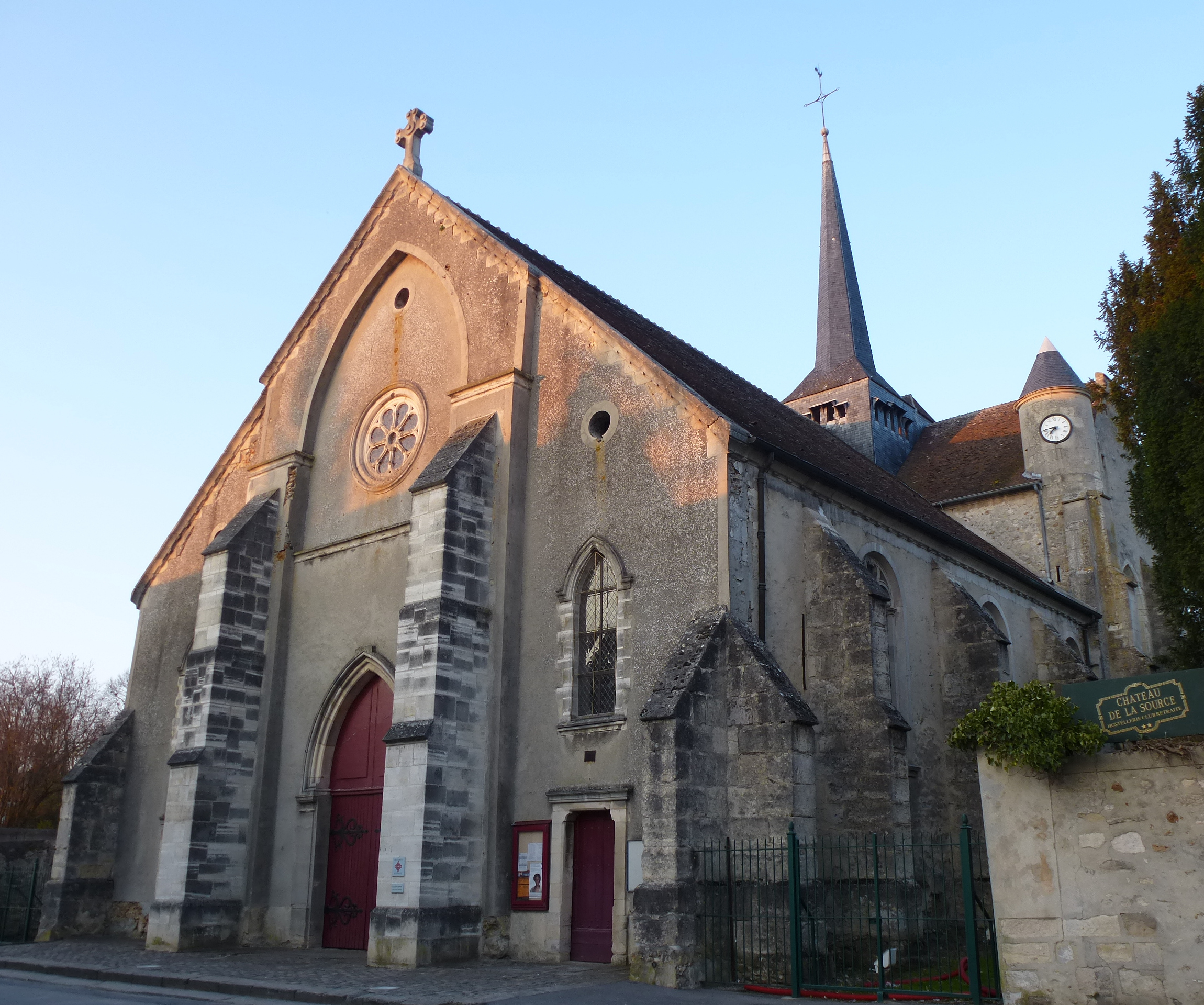 Église Saint-Germain de Nogent-l'Artaud; (département de l'Aisne , région Picardie).